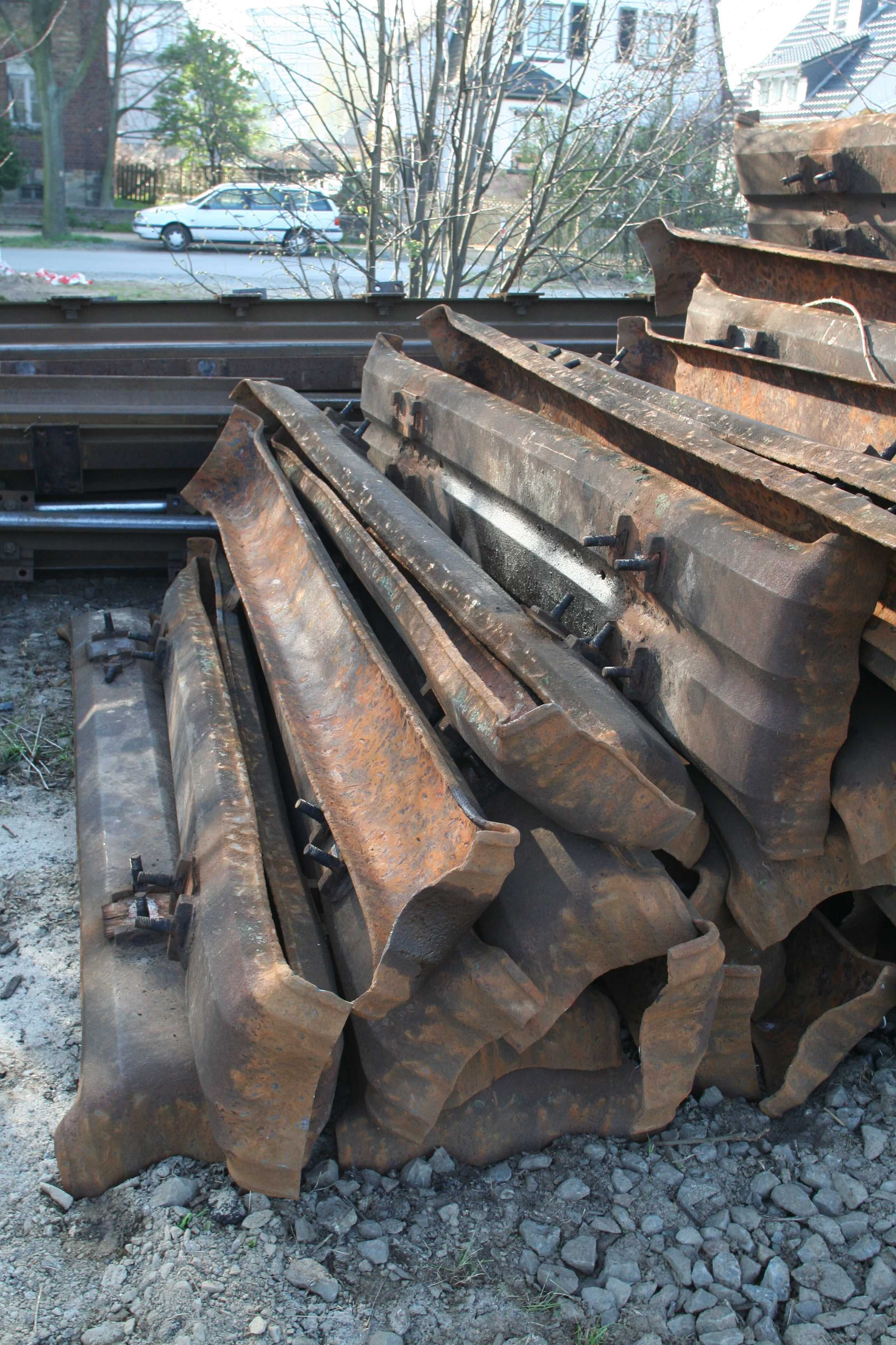 Stahlschwellen in Darmstadt-Kranichstein